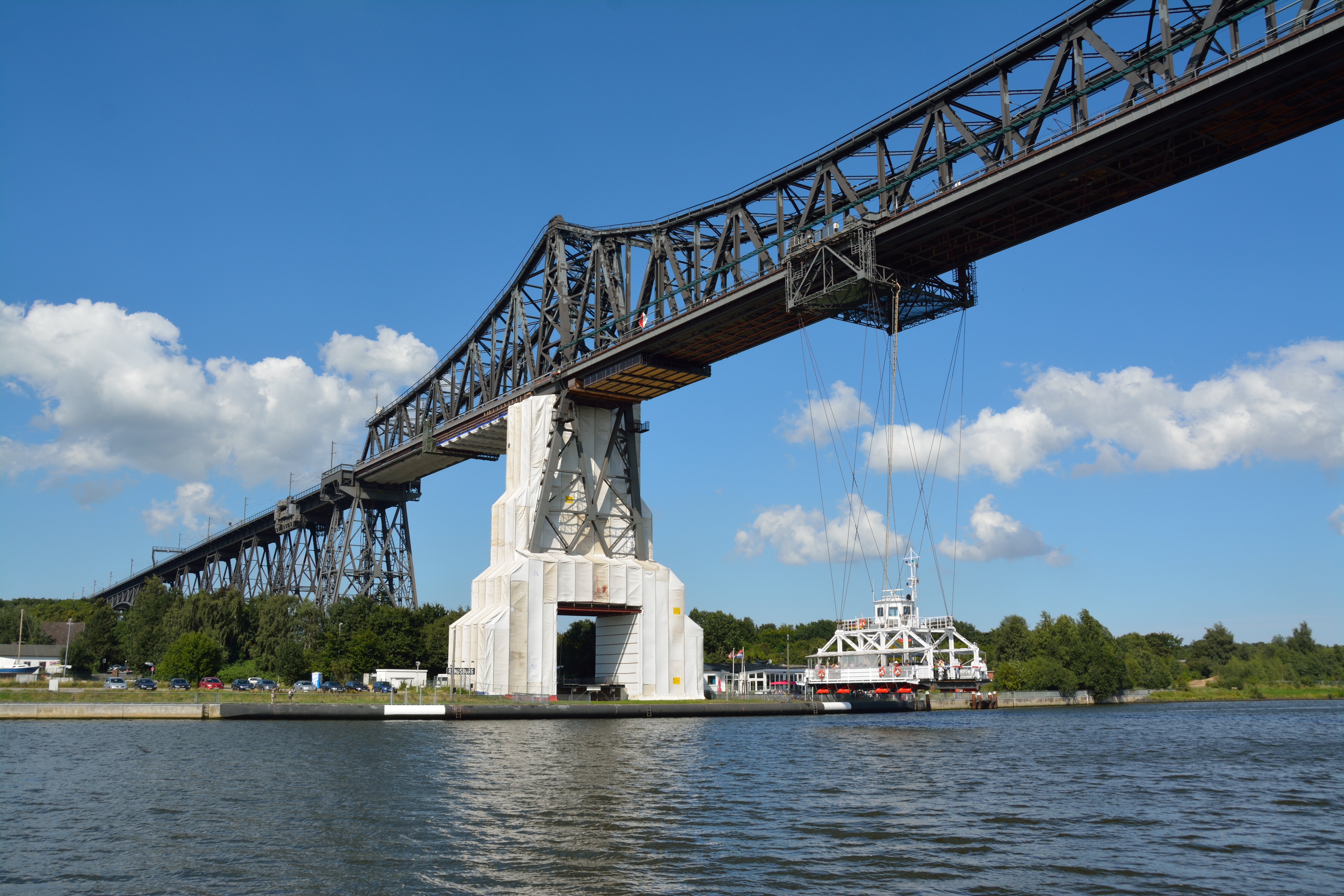 Impressionen der Schwebefähre Rendsburg im August 2013. Die Brücke wird zur Zeit saniert. Einige Infotafeln erläutern die Geschichte der Brücke.